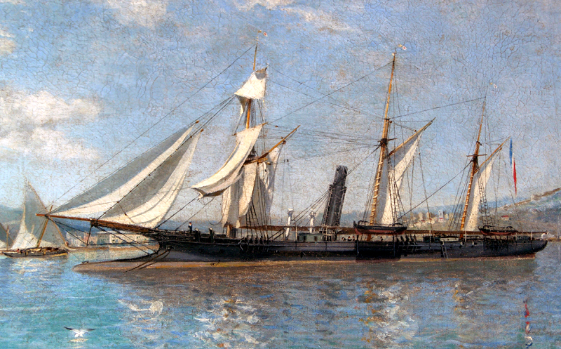 Tableau représentant l'aviso Le Renard